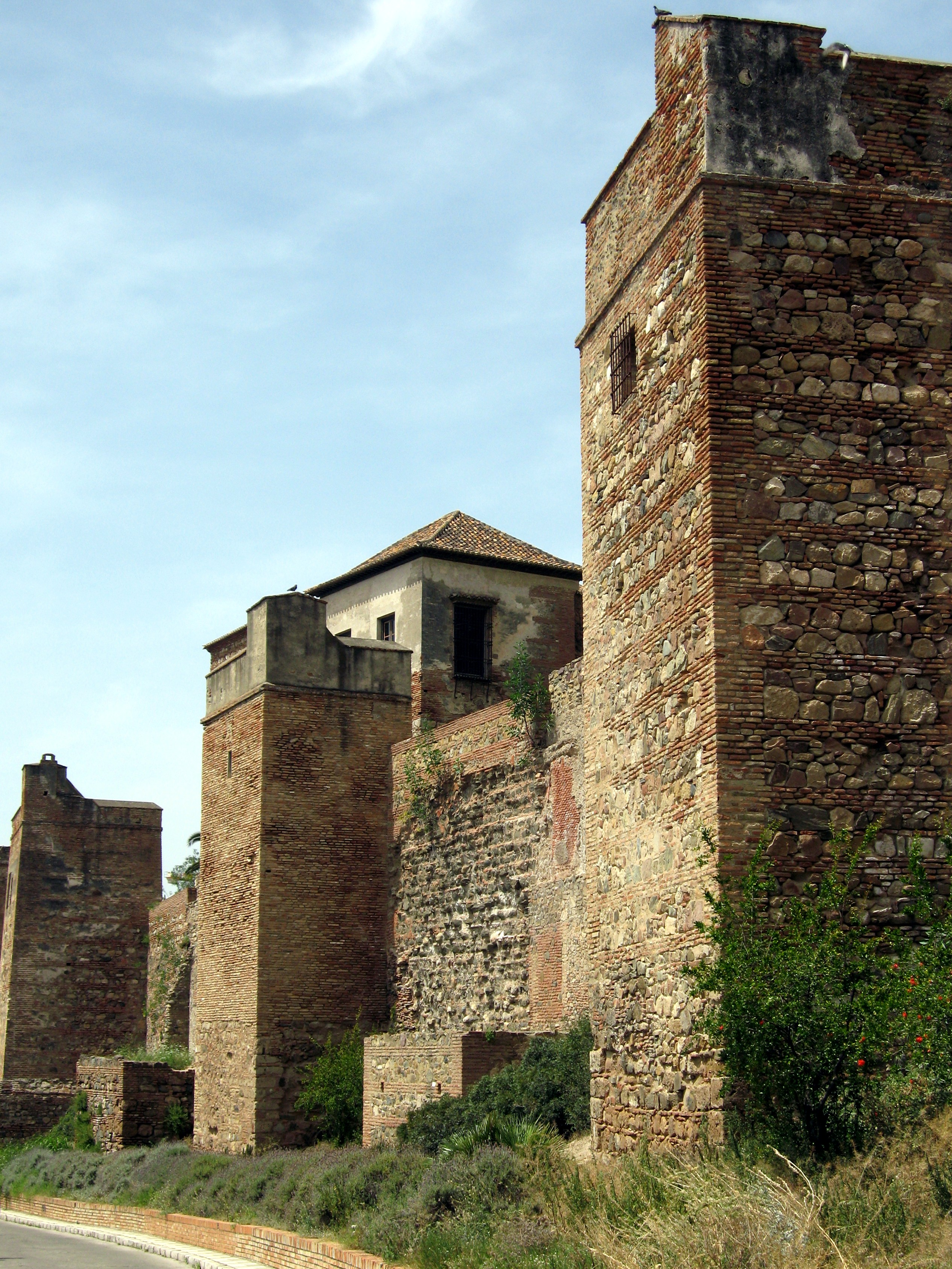 Alcazaba in Málaga, Andalusien, Spanien